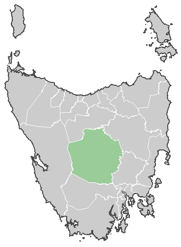 Conseil des Massifs Centraux, Tasmanie, Australie